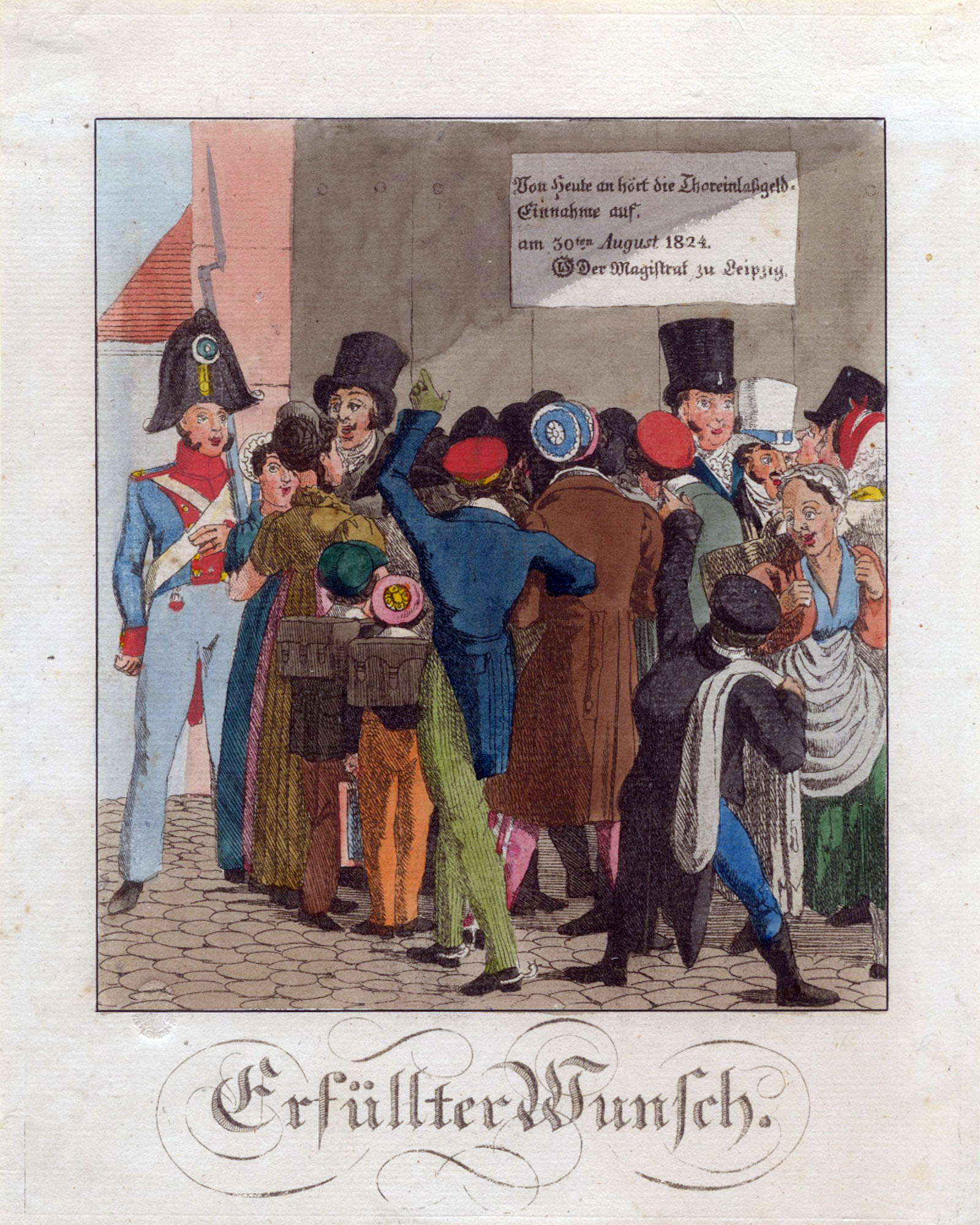 Kolorierte Federzeichnung von C.G.H. Geißler zur Aufhebung des Torgroschens in Leipzig 1824